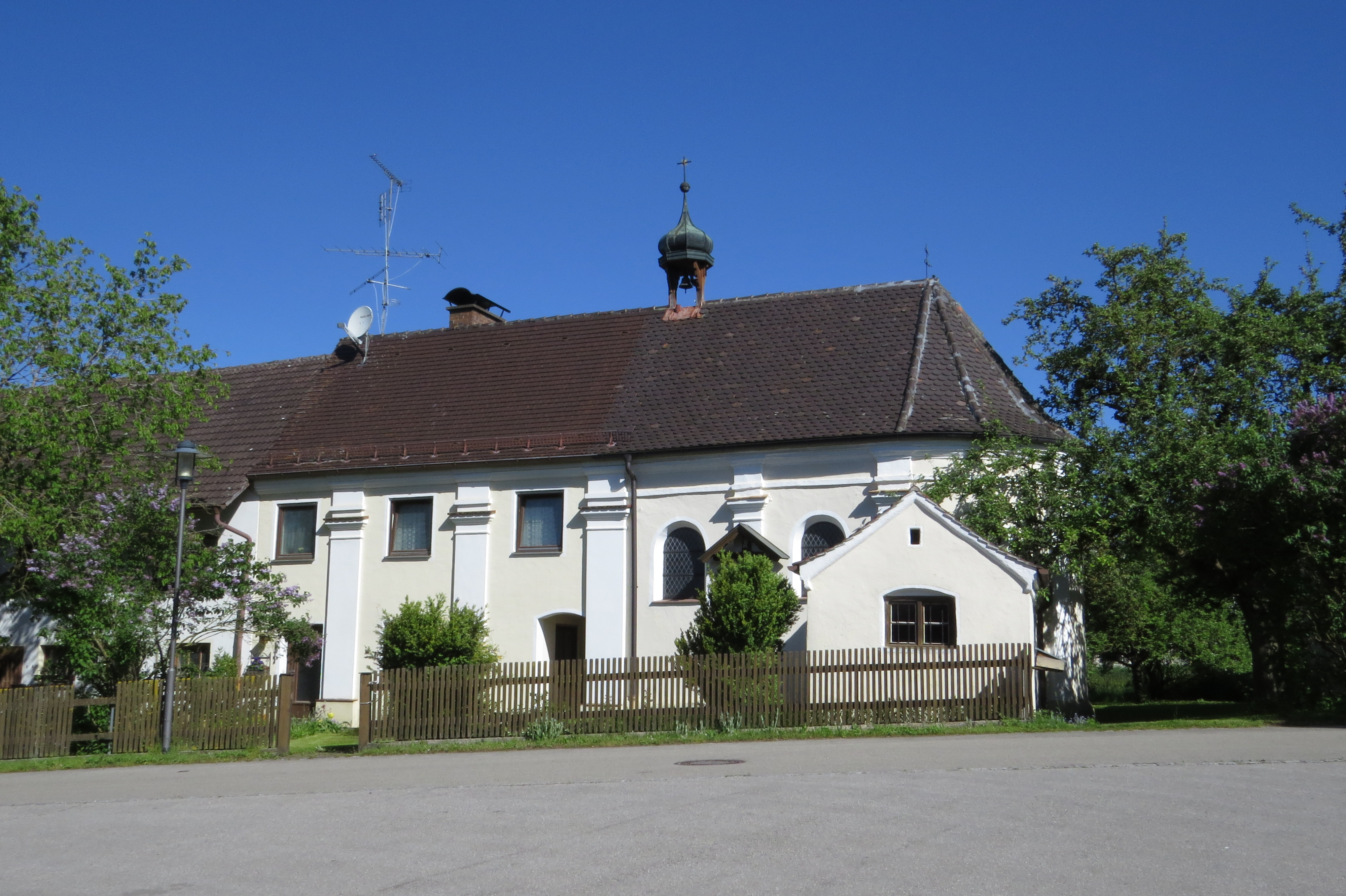 Einsiedelei in Unggenried, Mindelheim